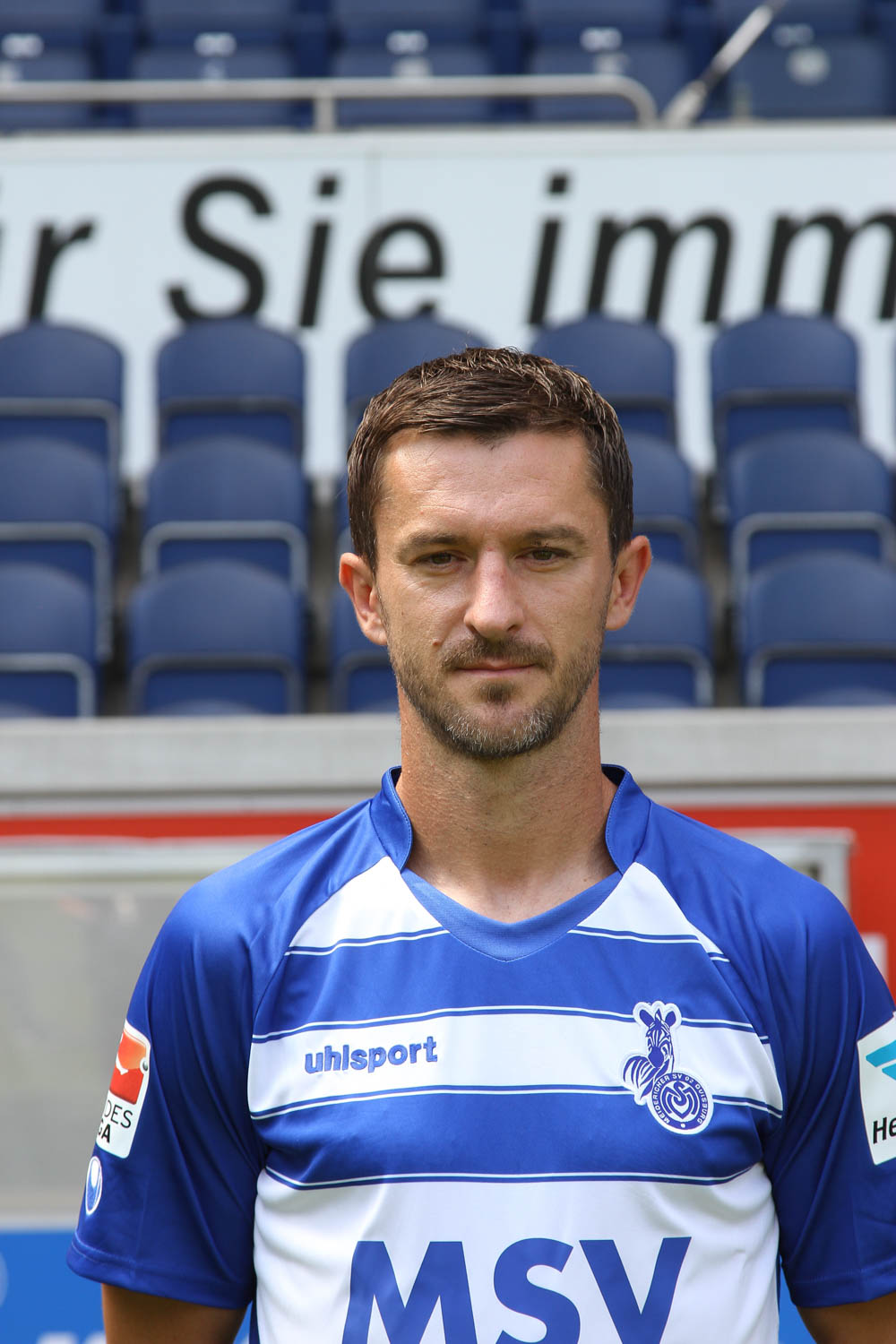 Branimir Bajić 2015